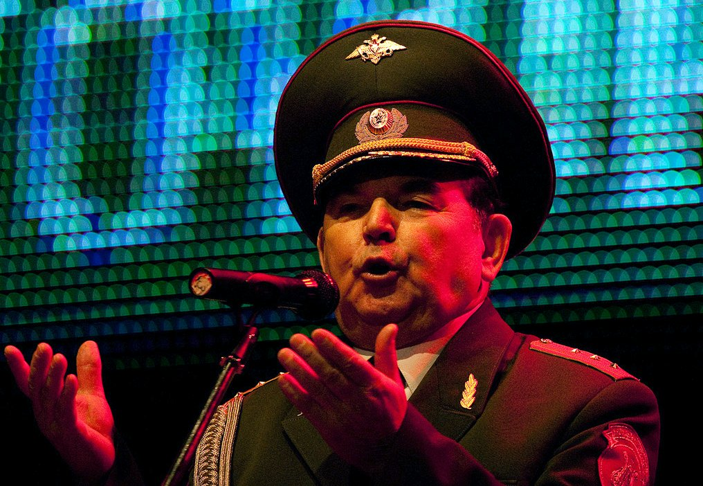 Vasilij Štefuca při vystoupení sólistů Alexandrovců v Kongresovém centru (Praha, Česká republika)